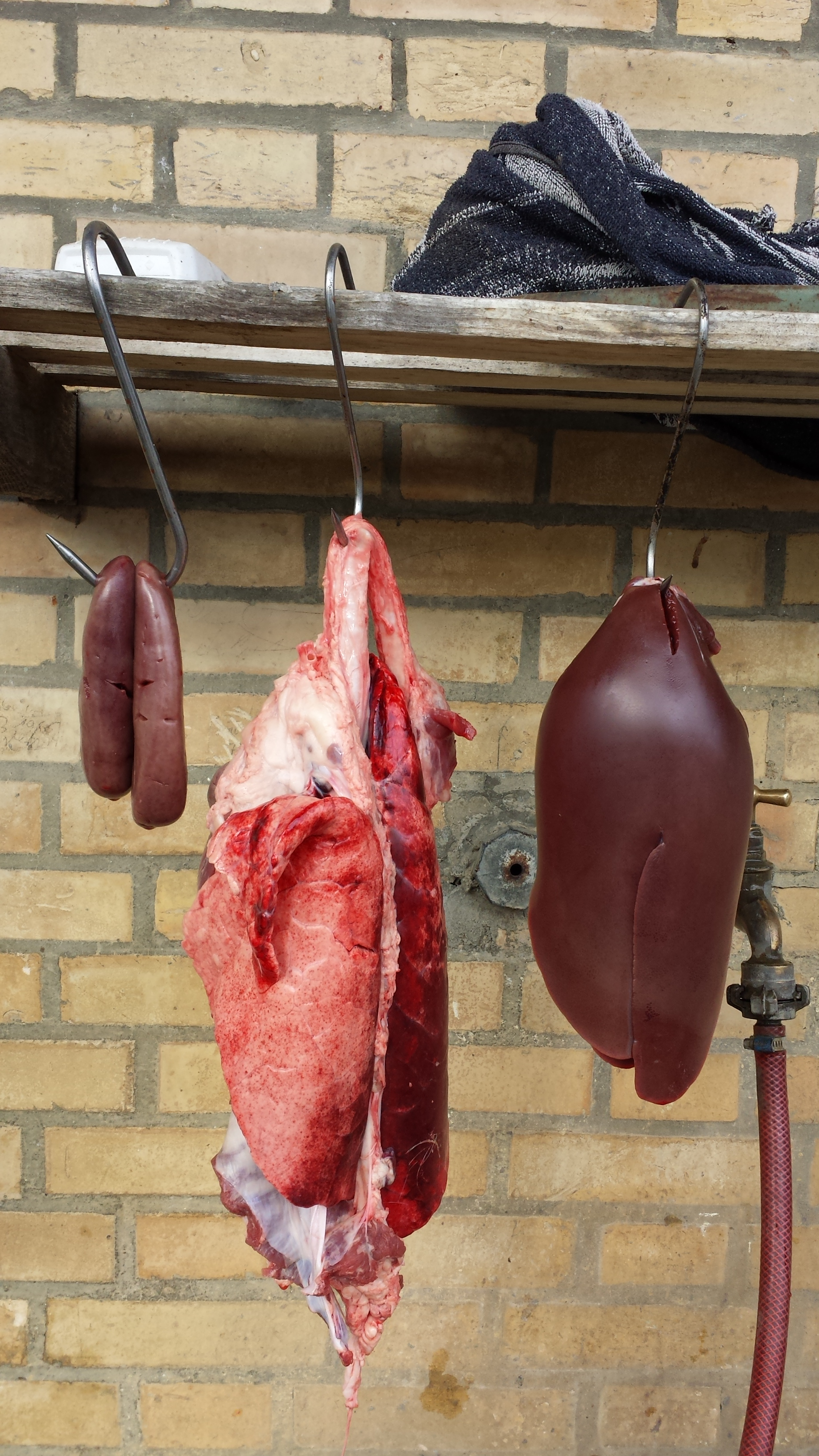 Von links nach rechts: Nieren, Lunge und Leber eines Hausschweins (Sus scrofa domestica) bei einer Hausschlachtung. Die Lunge hat sich bei der Schlachtung mit Blut gefüllt und ist deshalb rot und nicht weiss gefärbt.